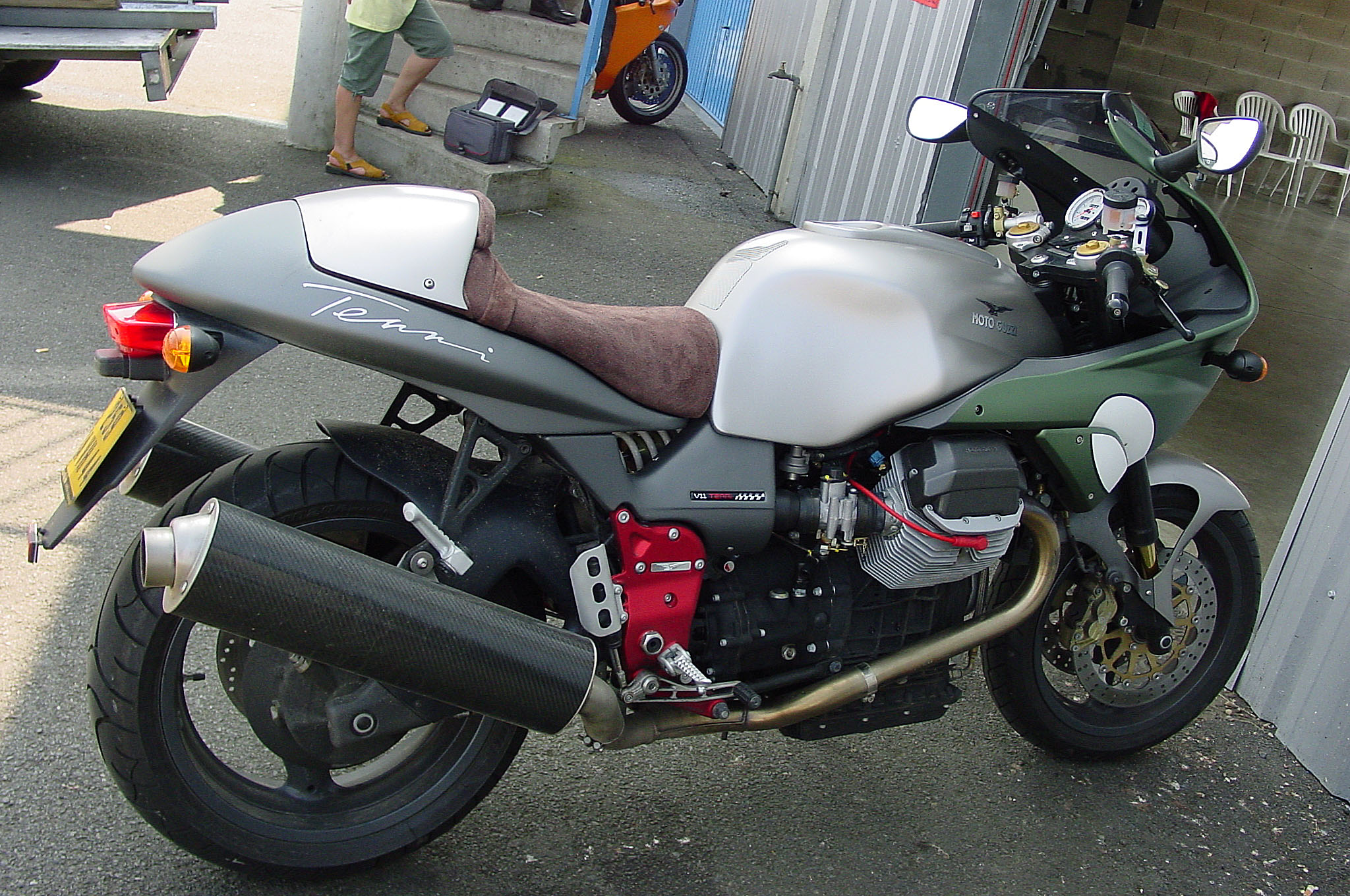 V11 Le Mans Tenni (2001-2002) - Série limitée à 150 exemplaires